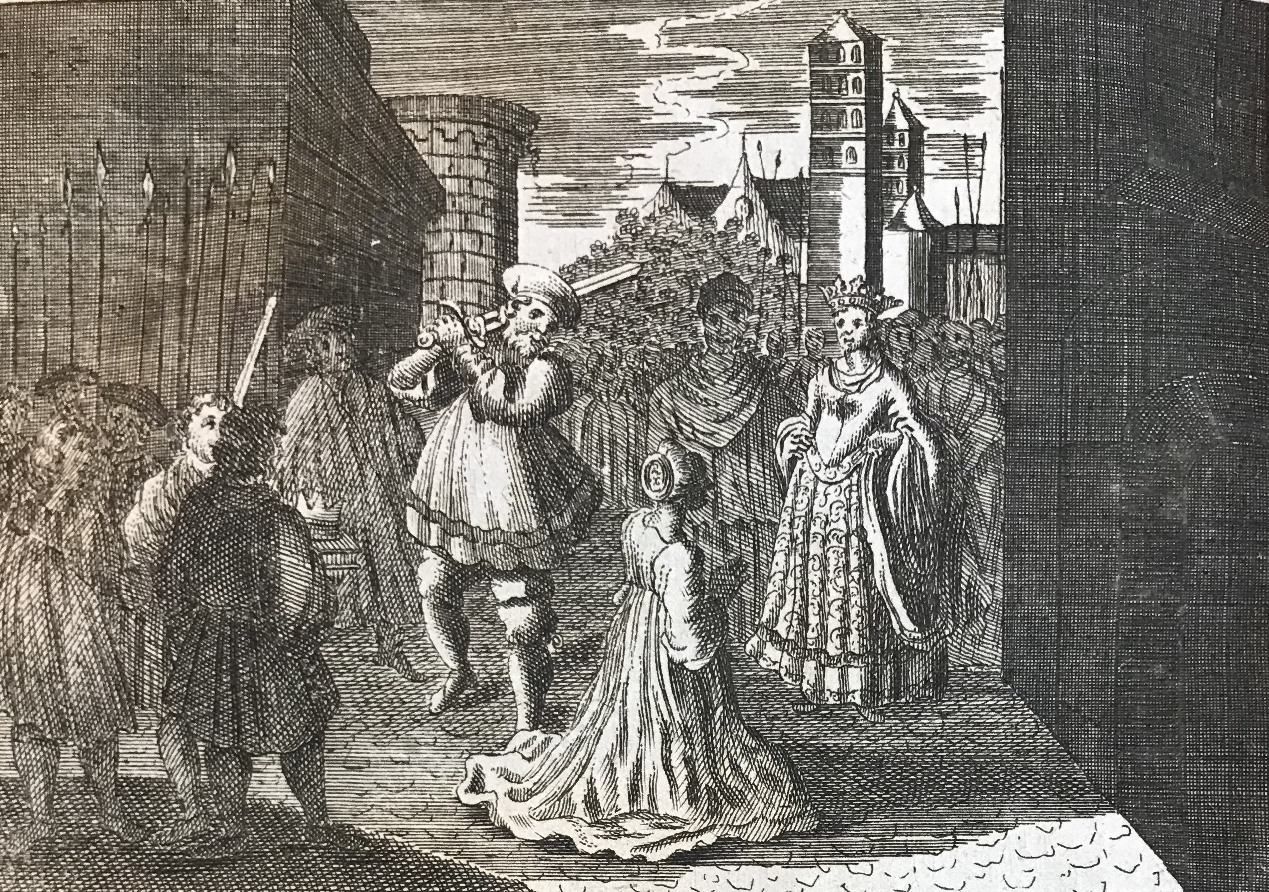 "König Johann enthauptet sein Weib" Kupferstich aus Hermann von Kerstenbroichs Werk "Die Raserei der Wiedertäufer welche Münster die berühmte Hauptstadt in Westphalen, zerstöret hat."